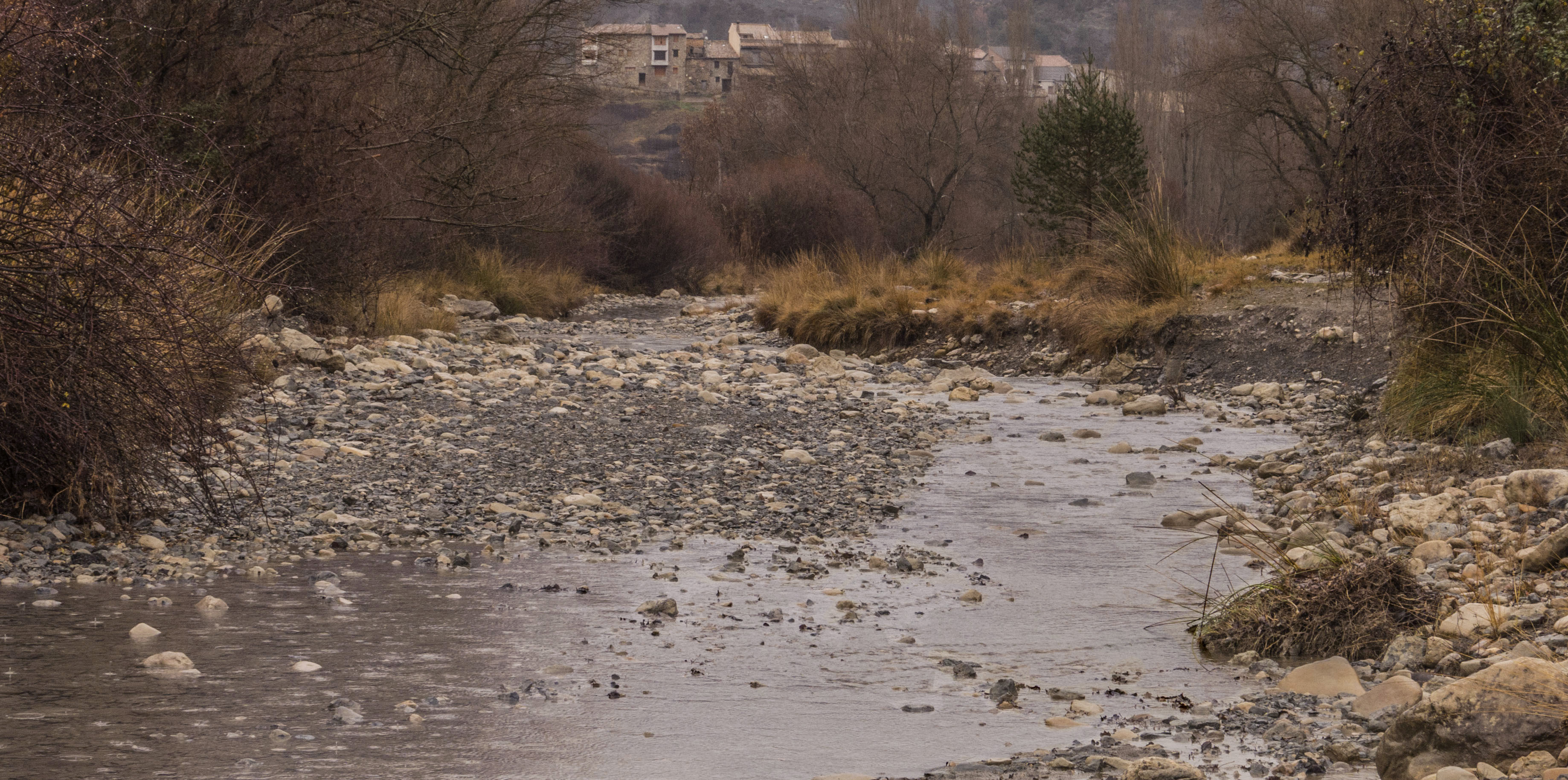 És un afluent del riu Isàvena. Les aigüés del barranc de Carrasquer baixen cap a l'est entre la serra del Jordal i la serra d'Esdolomada, i desemboquen al riu Isàvena a la Pobla de Roda.